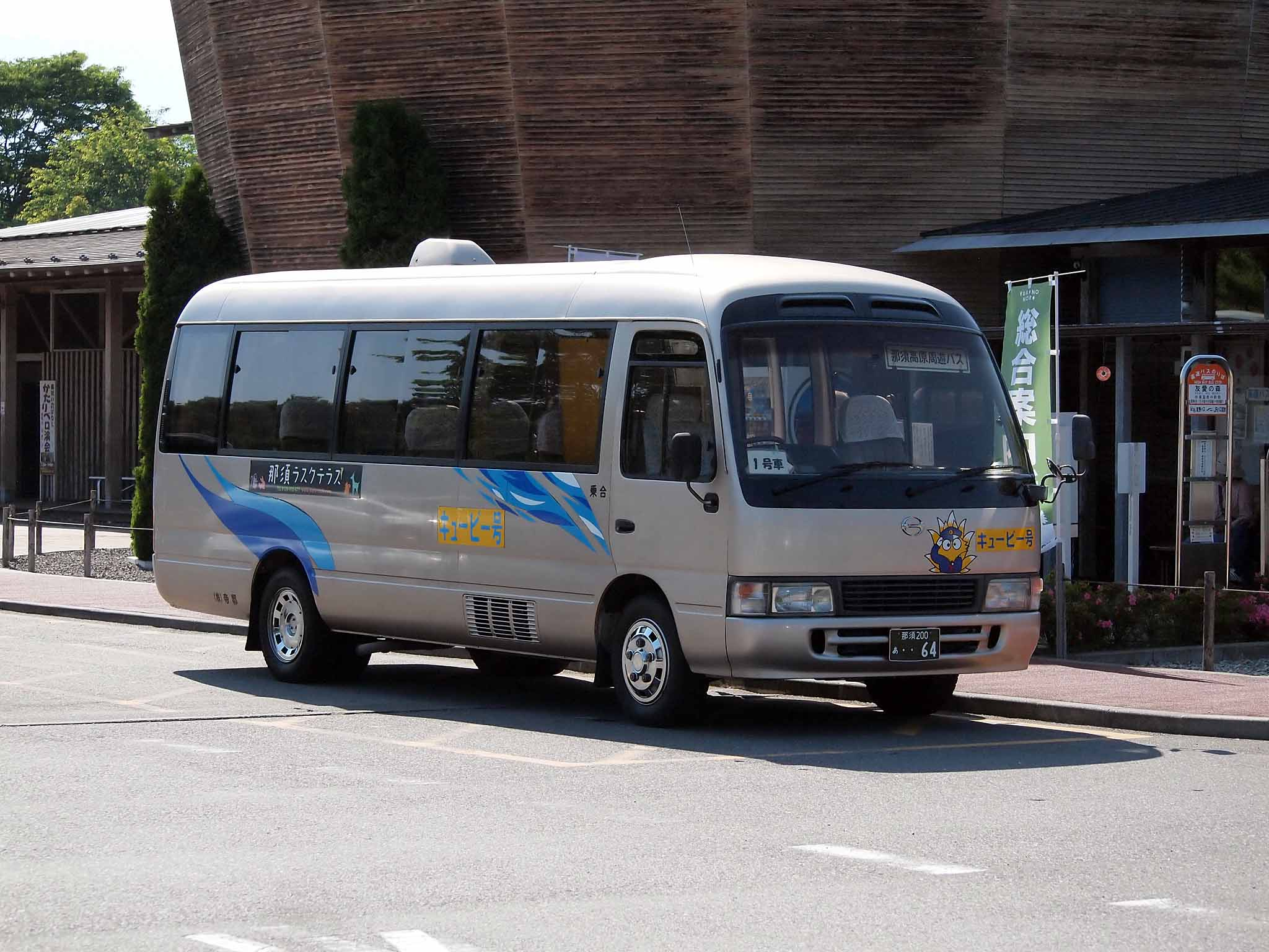 帝都が運行する那須高原エリアの観光周遊バス「きゅーびー号」。 登録番号：那須200あ‥64 撮影地：栃木県那須町、道の駅那須高原友愛の森 Olympus E-PL1